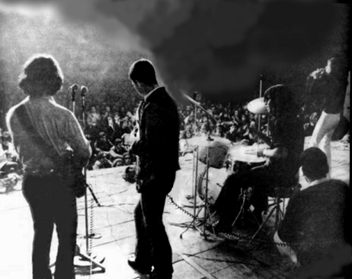 Los Mentales en el recital de los Super Grupos en el Luna Park - 12 de julio 1970